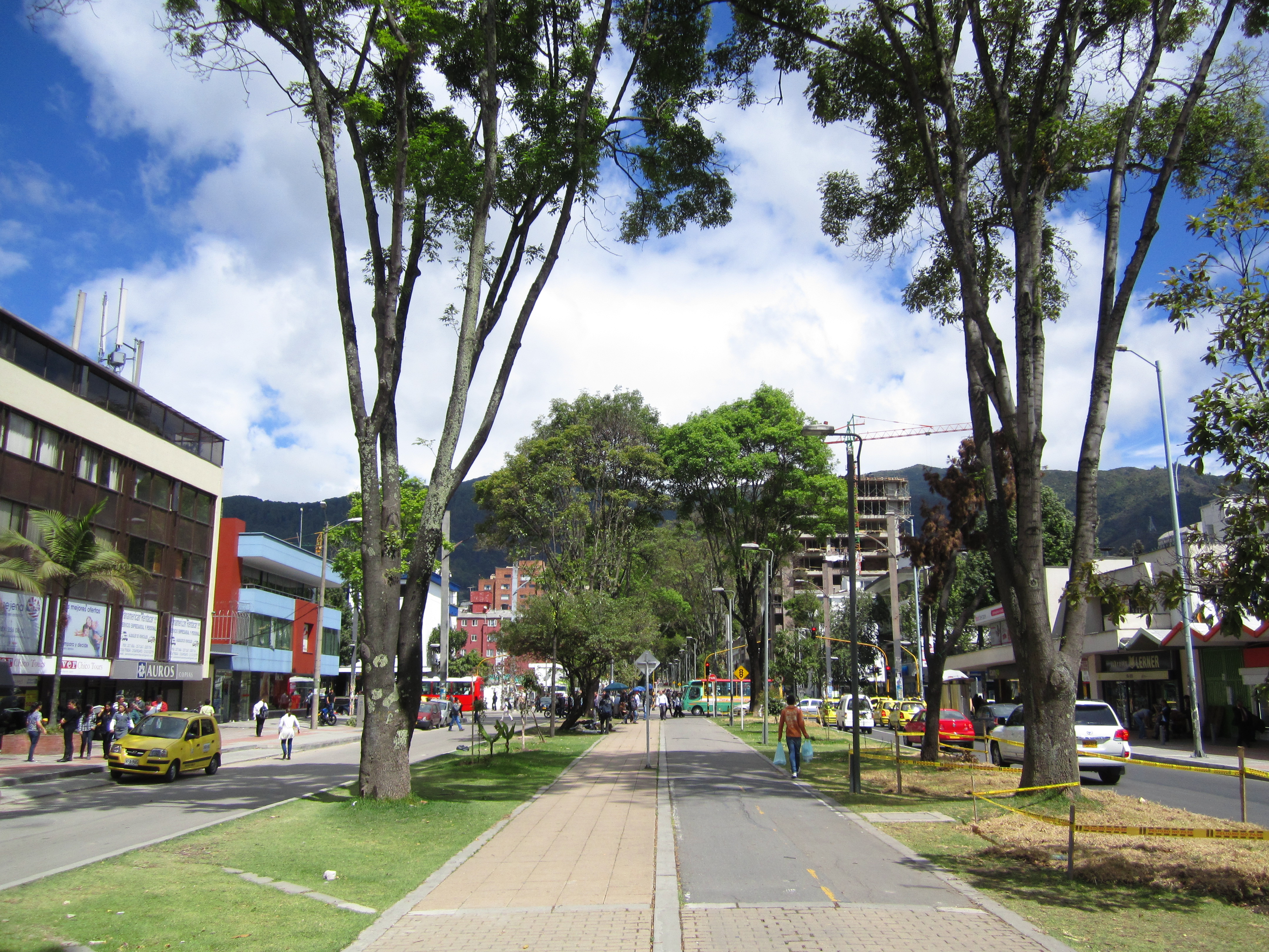 Bogotá, ciclorruta de la calle 92 entre las carreras 15 y 16 en El Chicó, al norte de la ciudad.